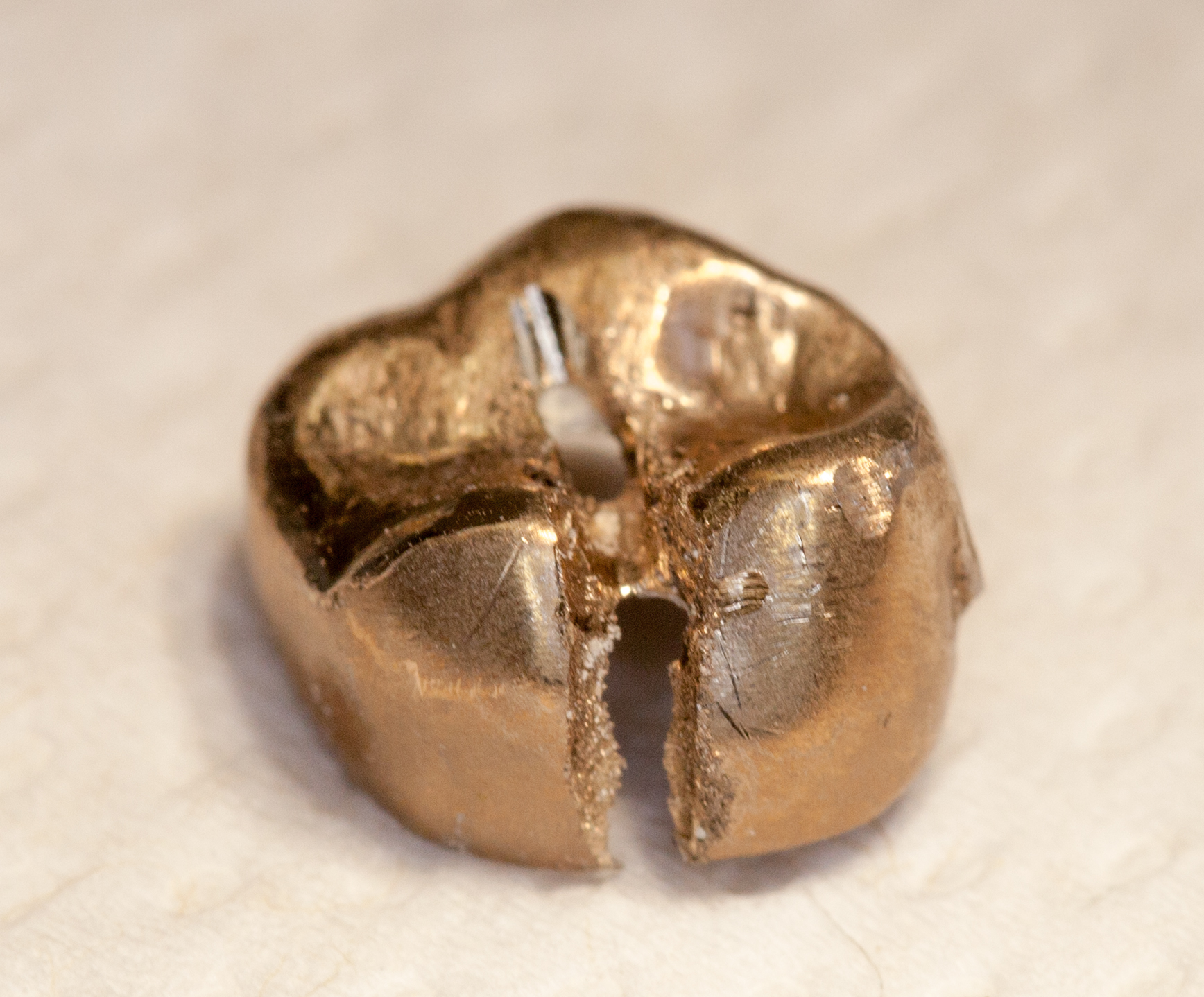 Entfernung einer Krone, aufgeschlitzter Goldzahn